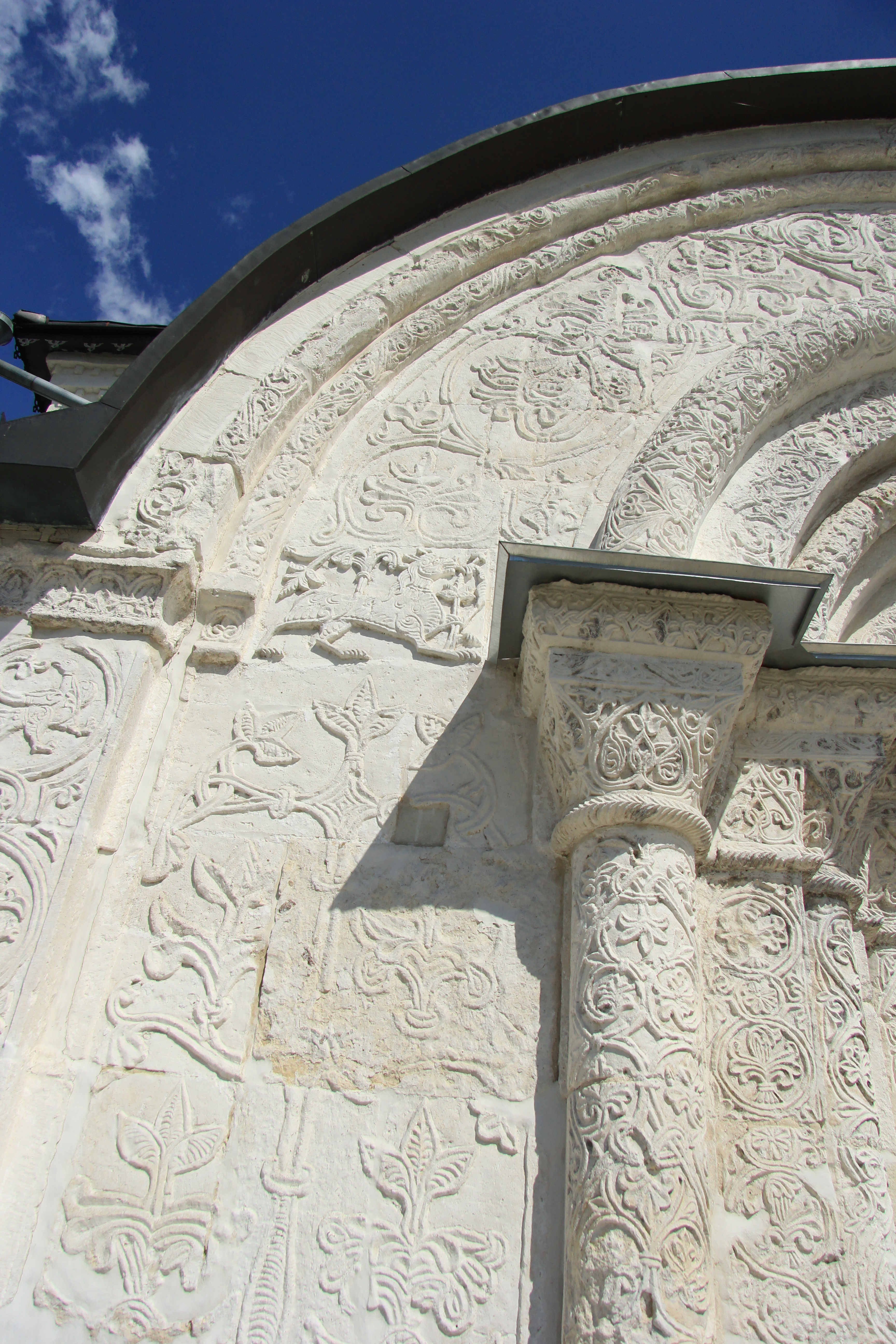 Собор Георгиевский (Георгиевский собор и земляные валы городища) (Владимирская область, Юрьев-Польский, 1 Мая улица)